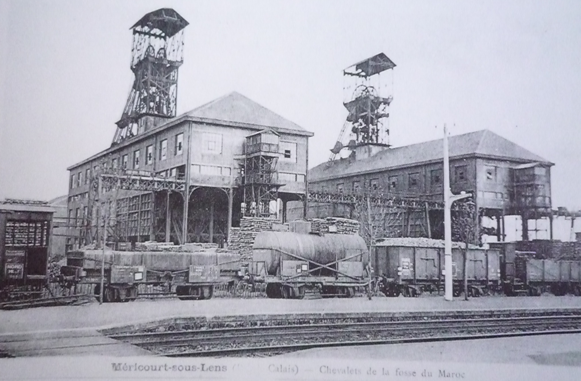 La Fosse n° 4 - 5 dite Maroc de la Compagnie des mines de Drocourt était un charbonnage constitué de deux puits situé à Méricourt, Pas-de-Calais, Nord-Pas-de-Calais, France.